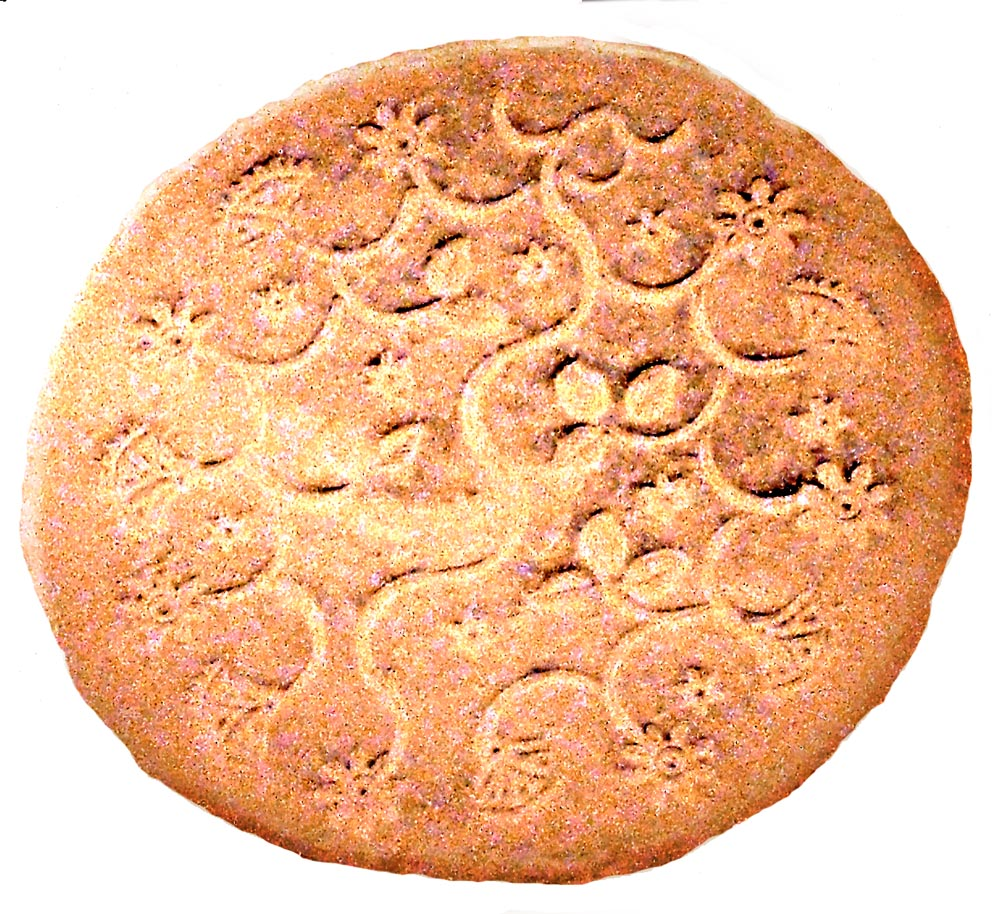 Oublie (pâtisserie) essai de création d'image